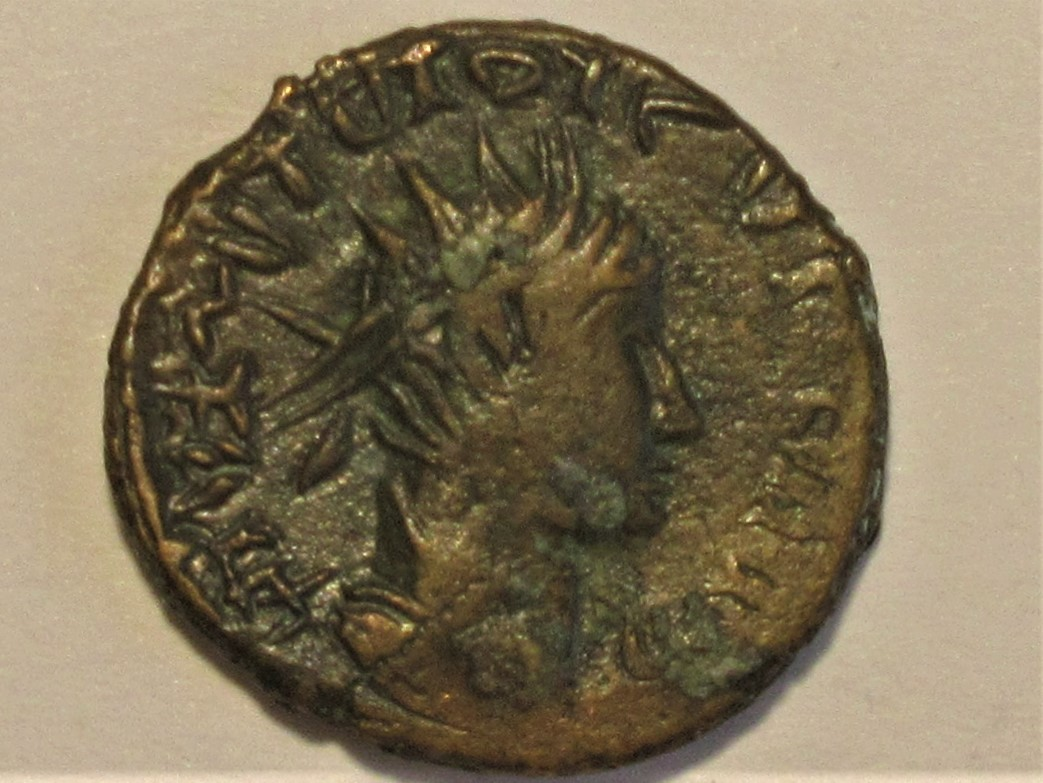 Beischlag einer Bronzemünze des Tetricus, stark barbarisiert